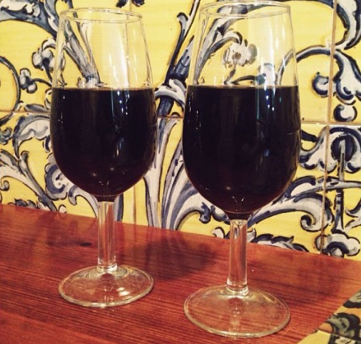 Mistela añeja de naranja costarricense